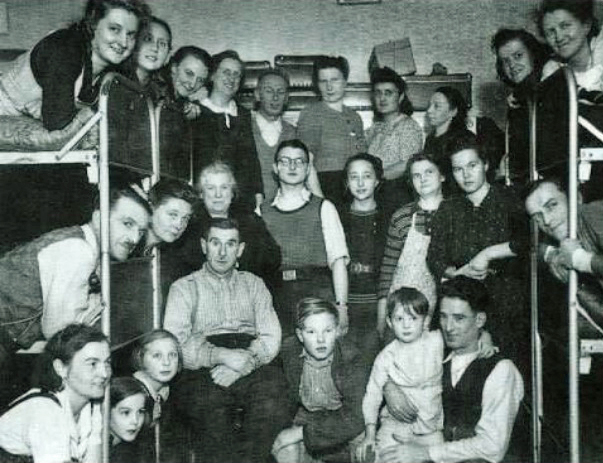 Familles mosellanes internées au camp spécial de Striegau par les nazis pour les " rééduquer ". Les détenus sont jusqu'à 72 dans un dortoir du Lager 122 de Striegau.